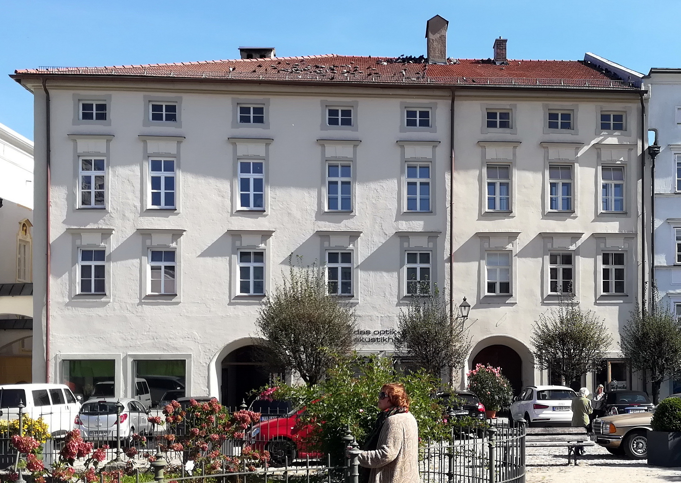 Stattlicher dreigeschossiger Eckbau zu acht Obergeschossachsen, aus zwei Gebäudeteilen mit gemeinsamer klassizistischer Fassade und flachem Walmdach, im Kern teilweise noch mittelalterlich, wohl 13./14. Jahrhundert, sonst spätes 16. Jahrhundert und 19. Jahrhundert, hofseitig am 1. Obergeschoss Arkadengang; bei Stadtplatz 2 b große Durchfahrt, bei Stadtplatz 2 a rückwärts zum Garagenhof hohe Tuffsteinmauer, 18. Jahrhundert.